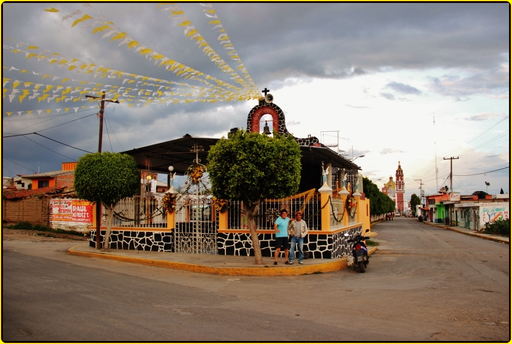 Capilla del Señor de Tepalcingo,San Gregorio Atzompa,Estado de Puebla,México